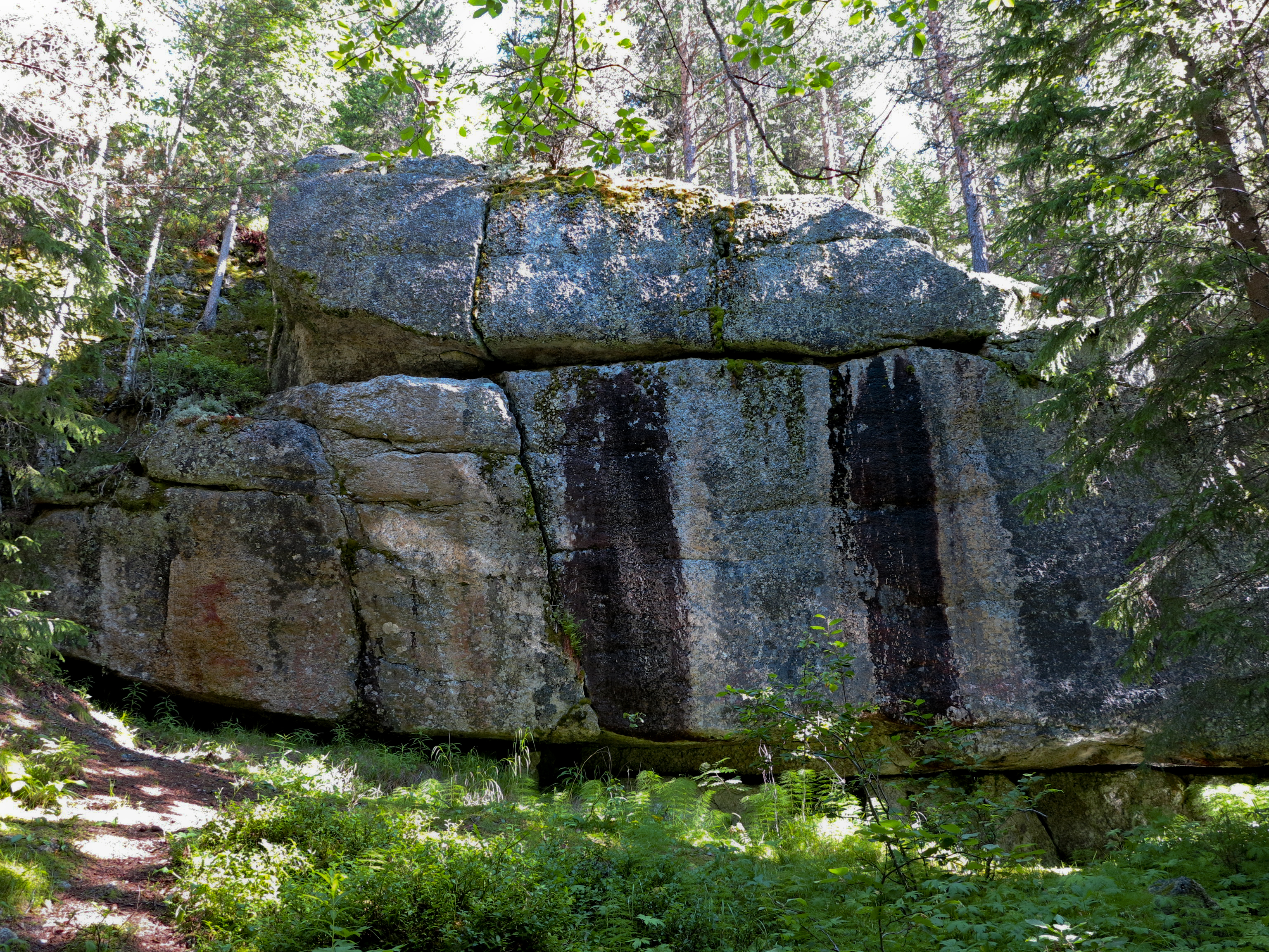 Åsele 151:1 Hällmålning